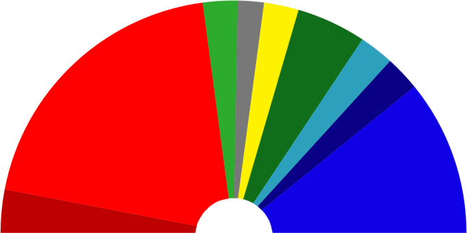 Mandatfördelning i Dalarnas landsting 2010-2014 Vänster-Höger Vänsterpartiet: 5 mandat Socialdemokraterna: 33 mandat Miljöpartiet: 4 mandat Dalarnas Sjukvårdsparti: 3 mandat Sverigedemokraterna: 4 mandat Centerpartiet: 8 mandat Folkpartiet: 4 mandat Kristdemokraterna: 4 mandat Moderaterna: 18 mandat